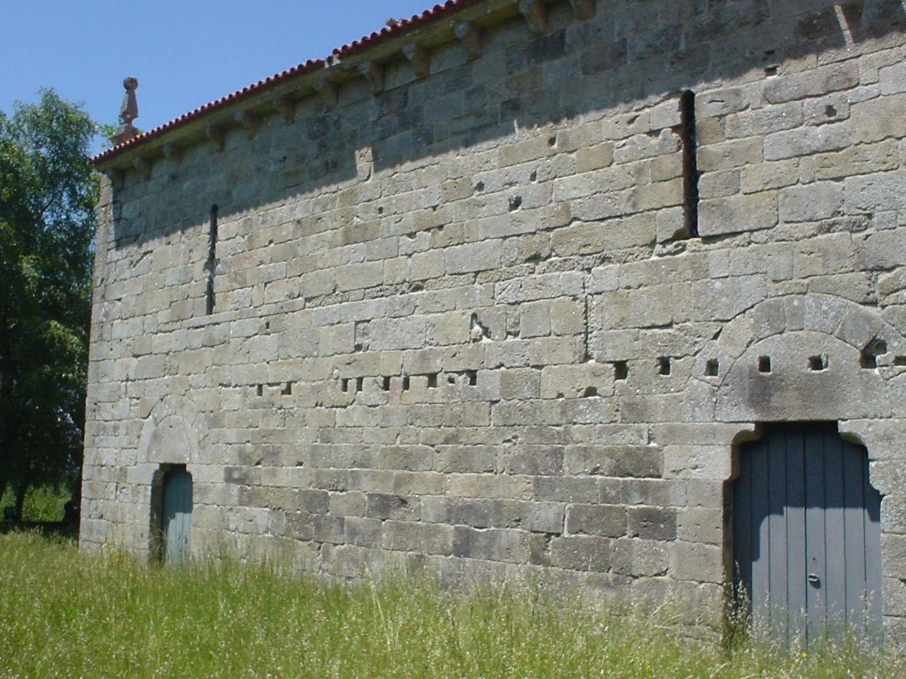 Kloster Fiaes, Portugal